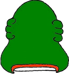 Glifo de Santiago de Anaya, Hidalgo